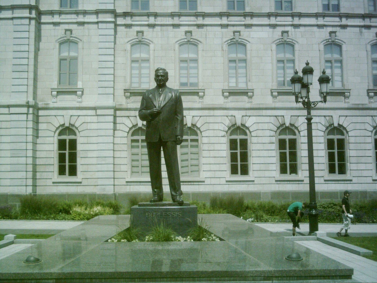 Statue de Maurice Duplessis, près de l'hôtel du Parlement, Québec